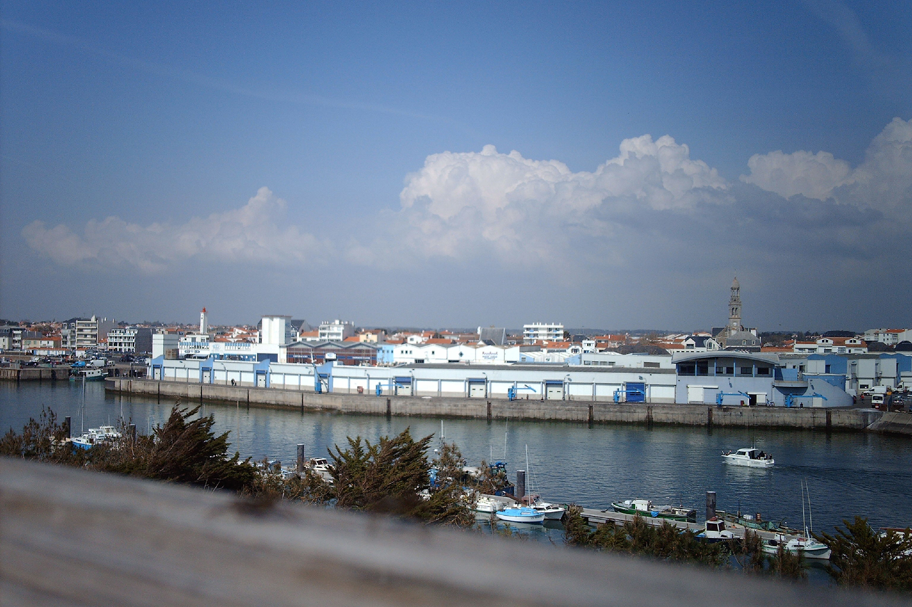 Saint-Gilles-Croix-de-Vie dans le département de la Vendée (France) : La criée du port de pêche côté Croix-de-Vie, vue depuis le belvédère de la « grande plage » de Saint-Gilles en avril 2007.